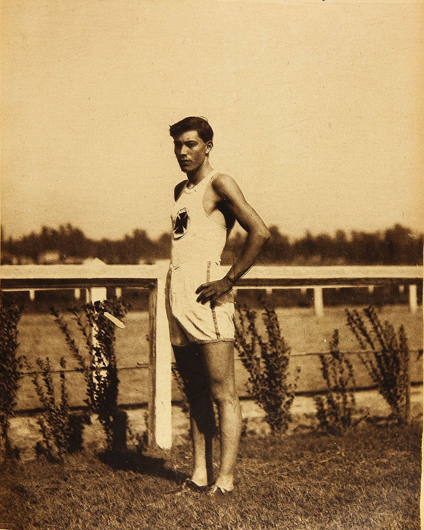 Manuel Plaza , corredor de fondo. (Descripción original: Manuel Plaza, nuestro gran corredor de fondo.)